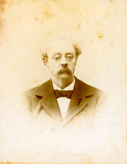 Inventeur Lampe Belge 1837-1912